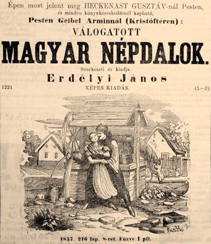 Erdélyi János Magyar népdalok címlapja